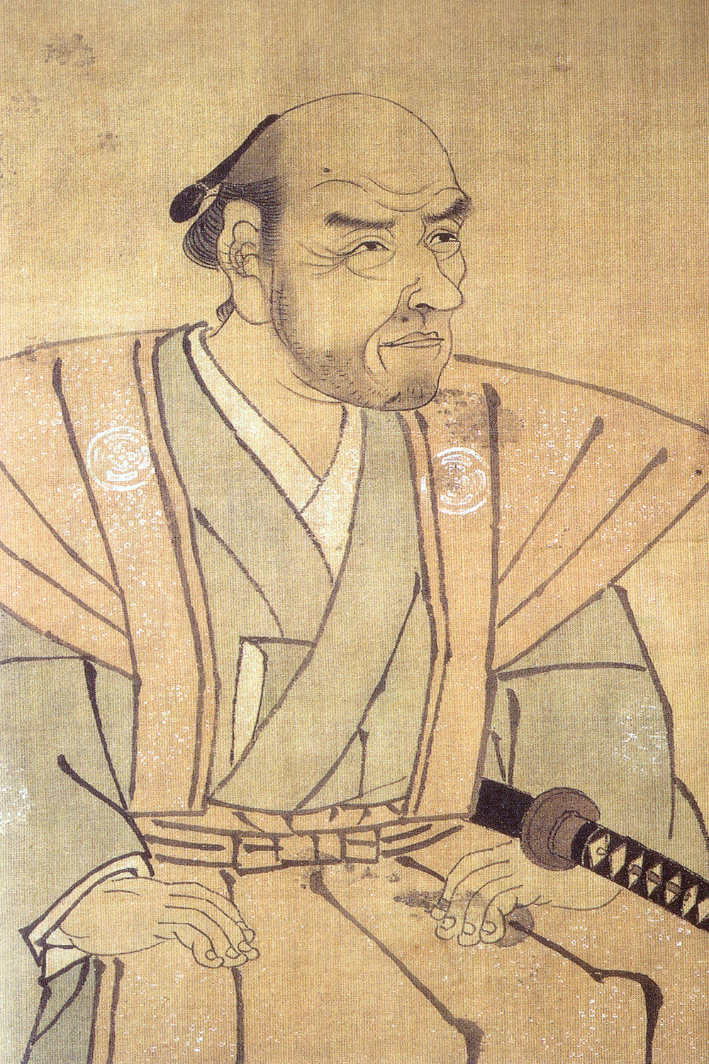 尊徳座像（部分）